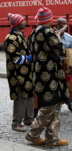 Igbo Isiagu apparel